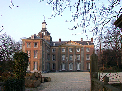 Eigen werk